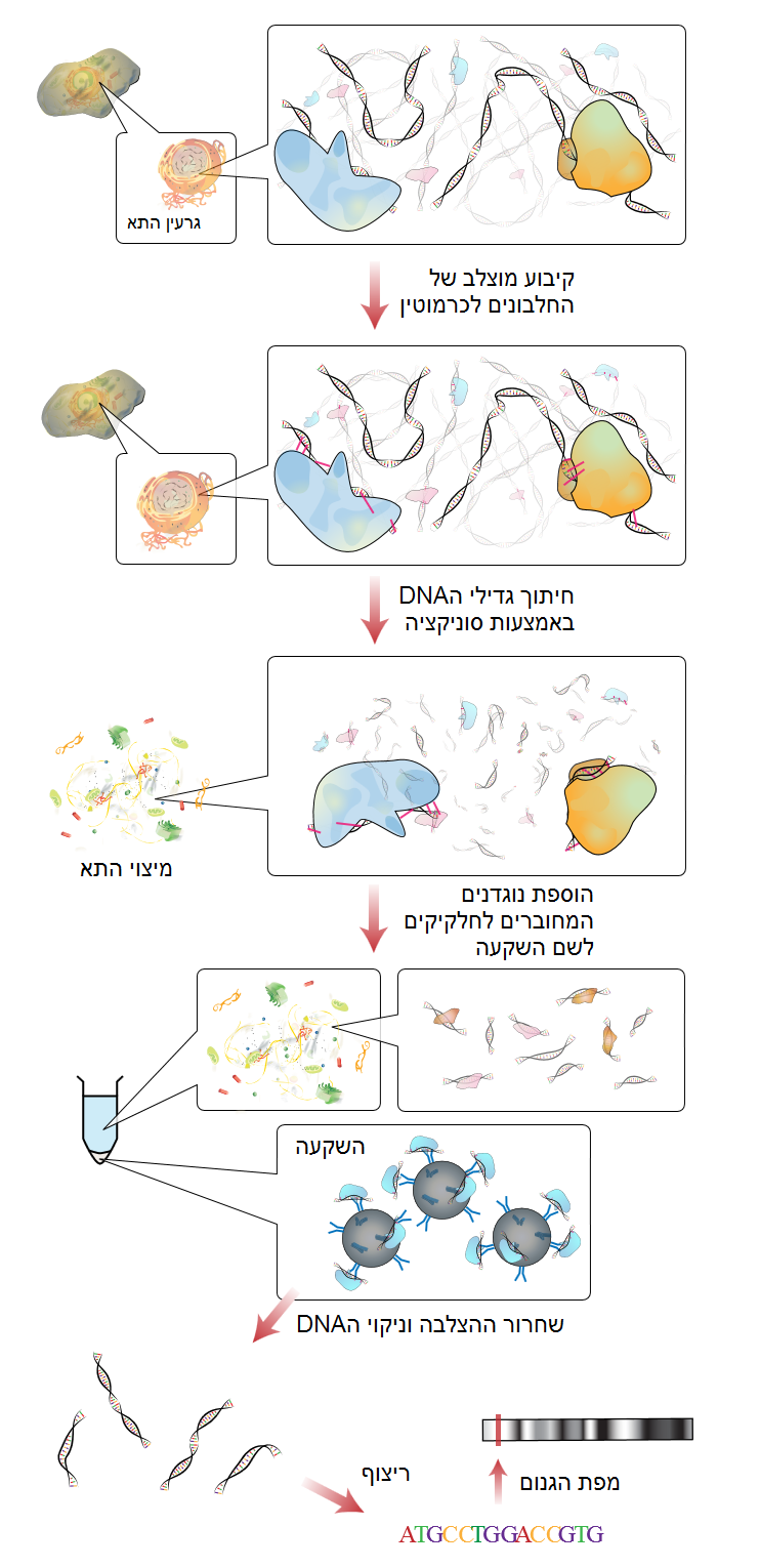 מיצוי נוגדני של כרומטין